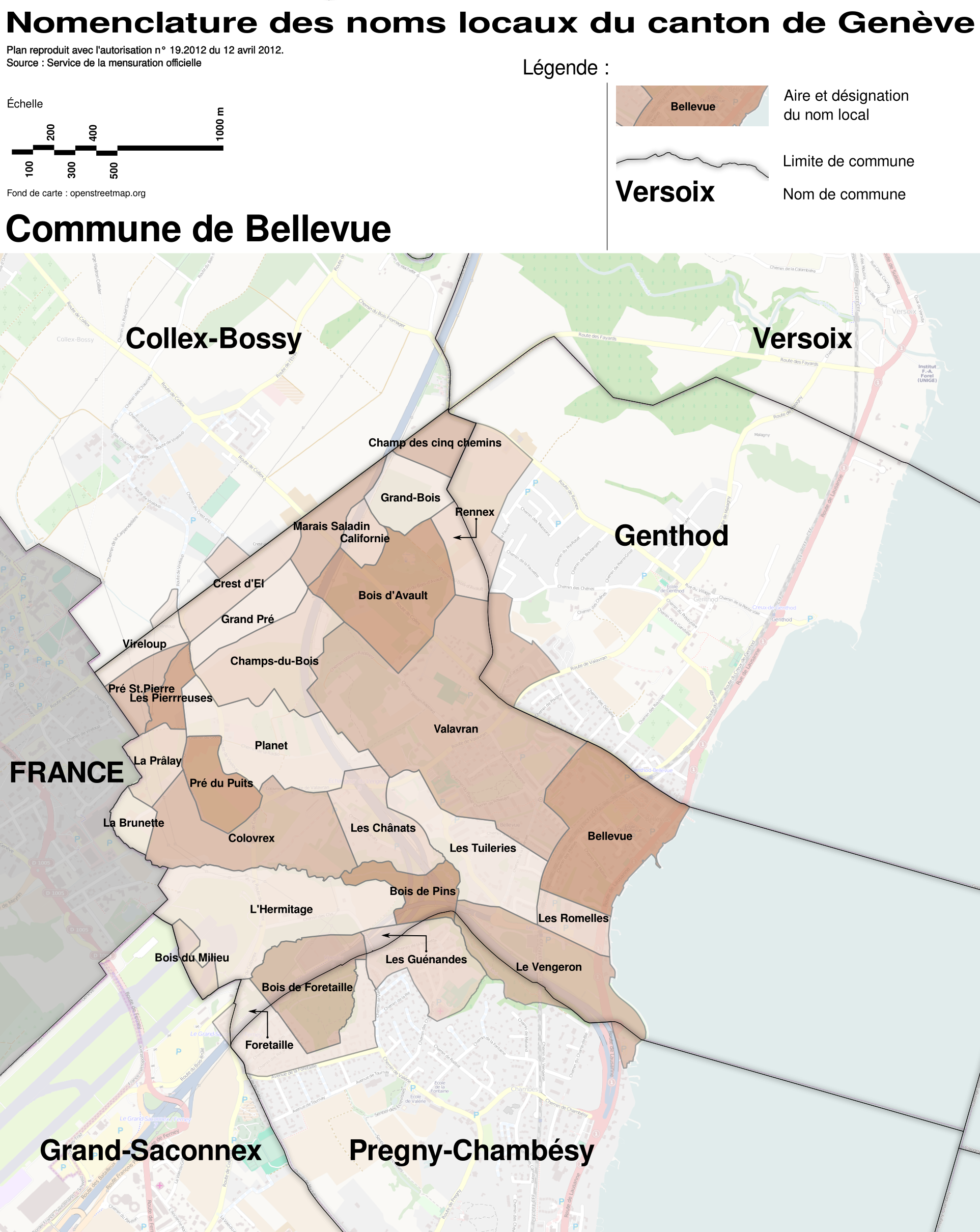 Nomenclature des noms locaux du canton de Genève, généralement appelés "Lieux-dit". Cette nomenclature a été recueillie entre 1932 et 1953 lors de la création du Plan d'Ensemble (PE) du canton de Genève. Plan reproduit avec l'autorisation n° 19.2012 du 12 avril 2012. Source : Service de la mensuration officielle.